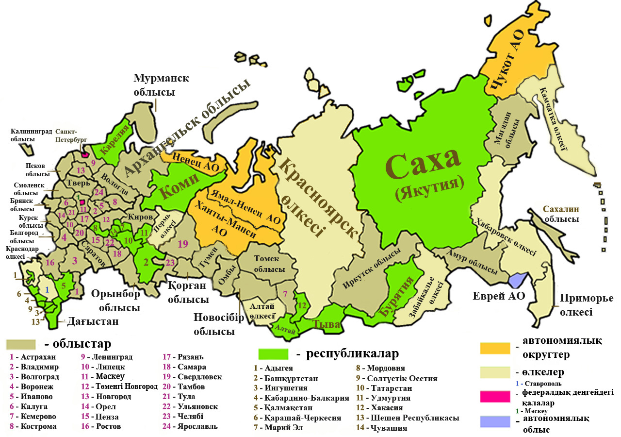 Ресейдің әкімшілік-аумақтық құрылымы